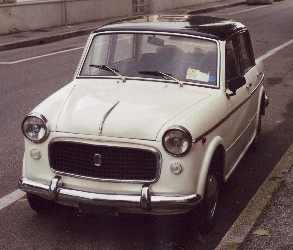 Fiat 1100/103 Special del 1960